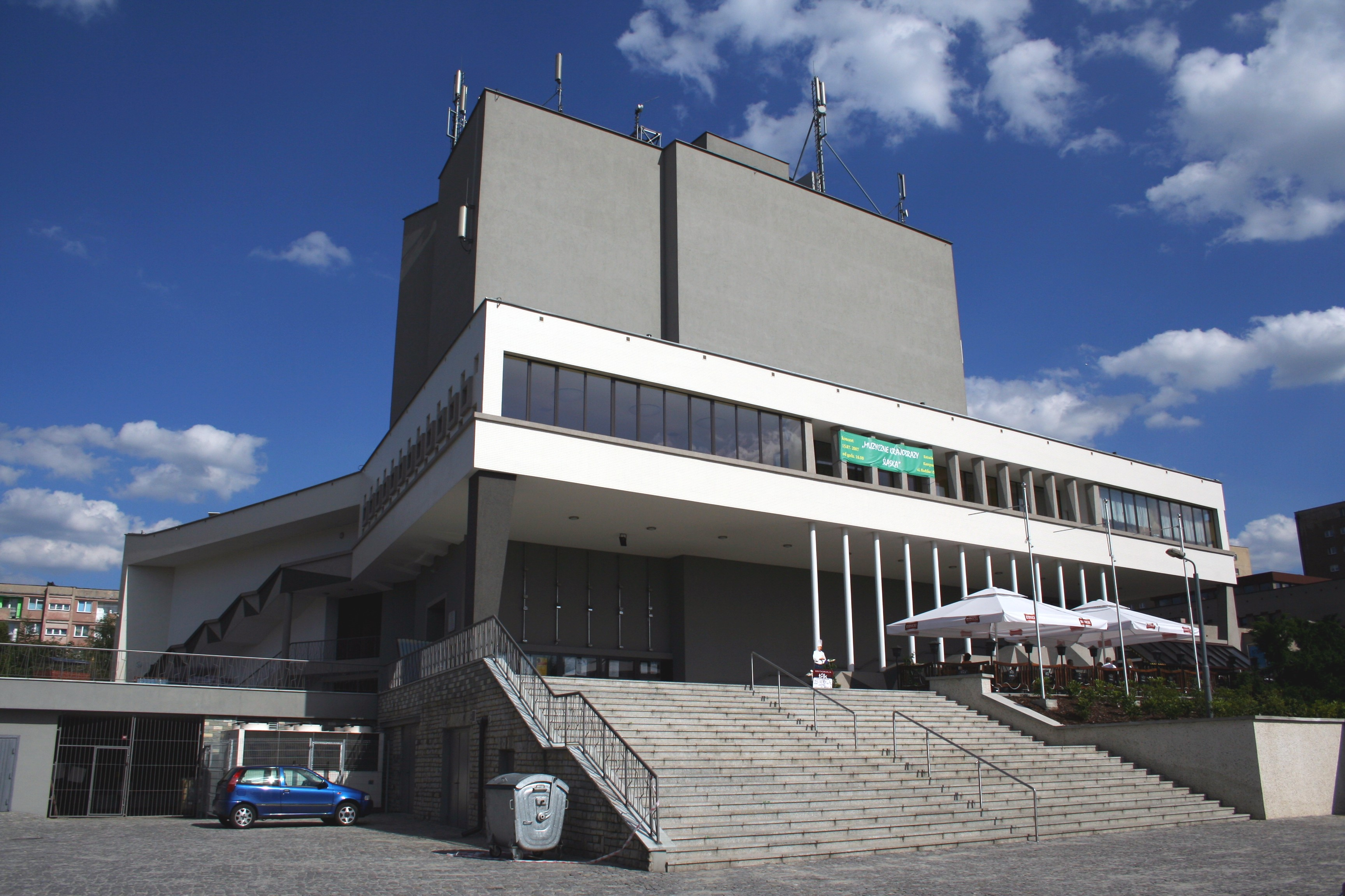 Budova divadla v Rybniku